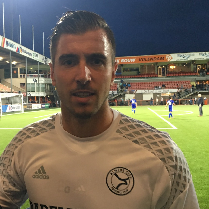 Chiel Kramer na afloop van de wedstrijd FC Volendam - Almere City FC (1-1).